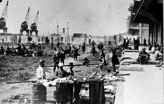 Desocupados en el puerto de Buenos Aires. Villa Desocupación en Retiro.